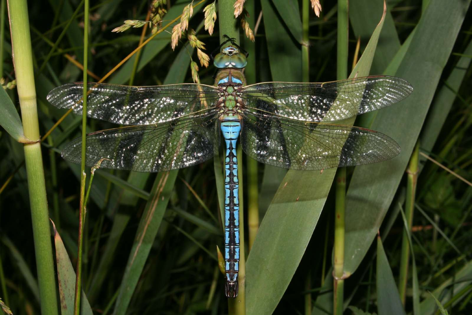 Große Königslibelle (Anax imperator) im NSG Buddenhagener Moor, Mecklenburg-Vorpommern.